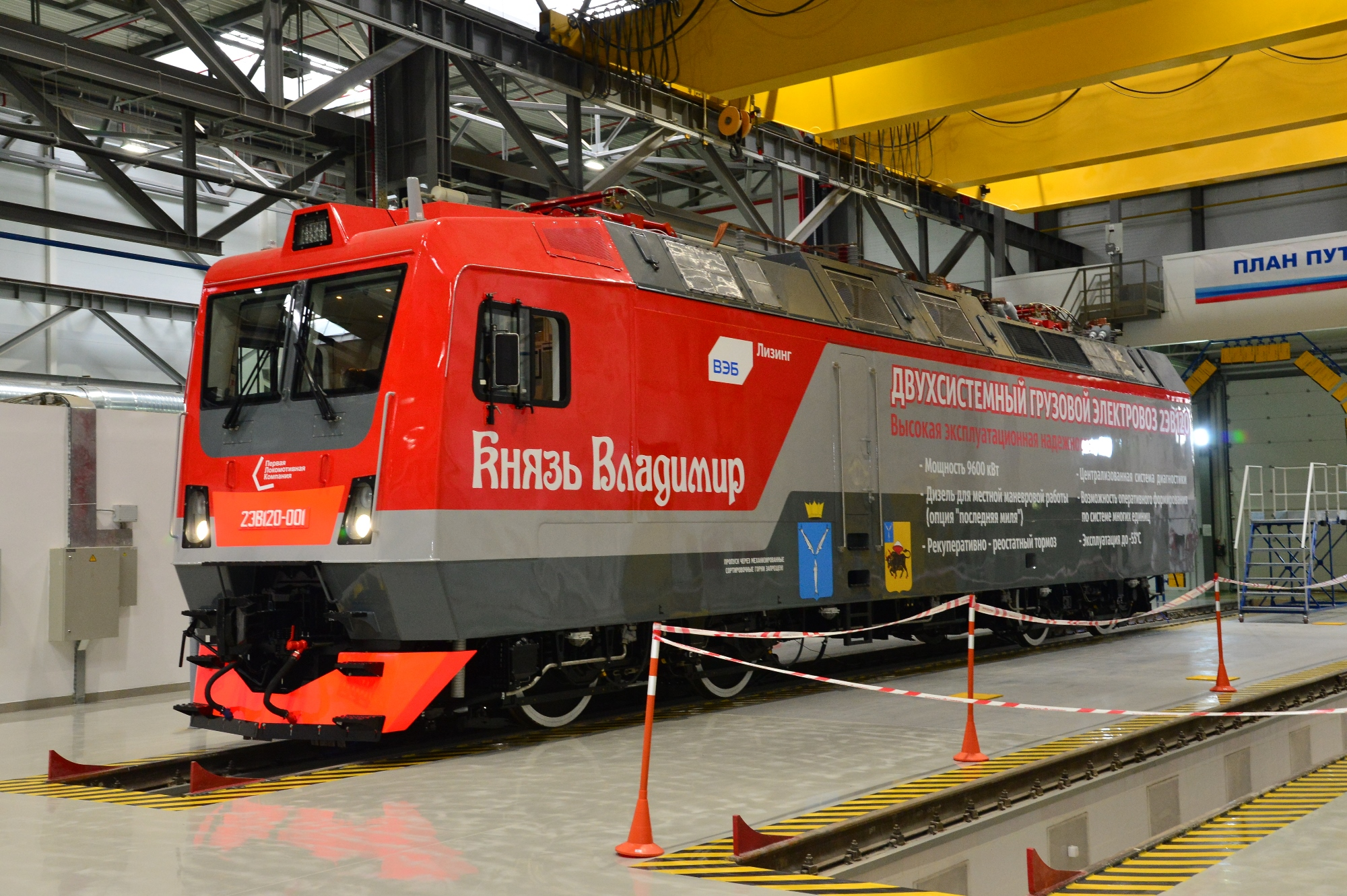 Секция электровоза 2ЭВ120-001 на Энгельсском Локомотивном заводе